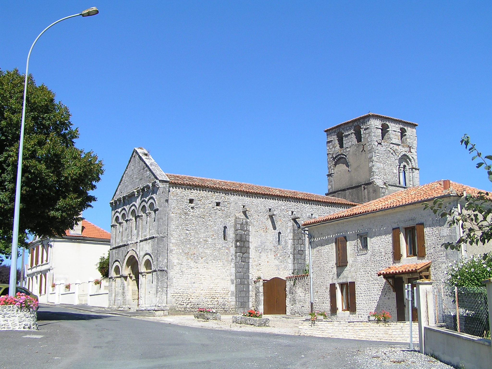 église de Bécheresse, Charente, France